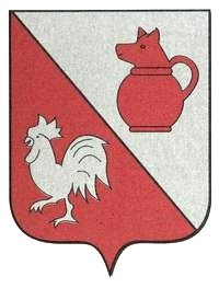 Tranché au 1 d'argent à une boelle de gueules, au 2 de gueules à un coq d'argent.